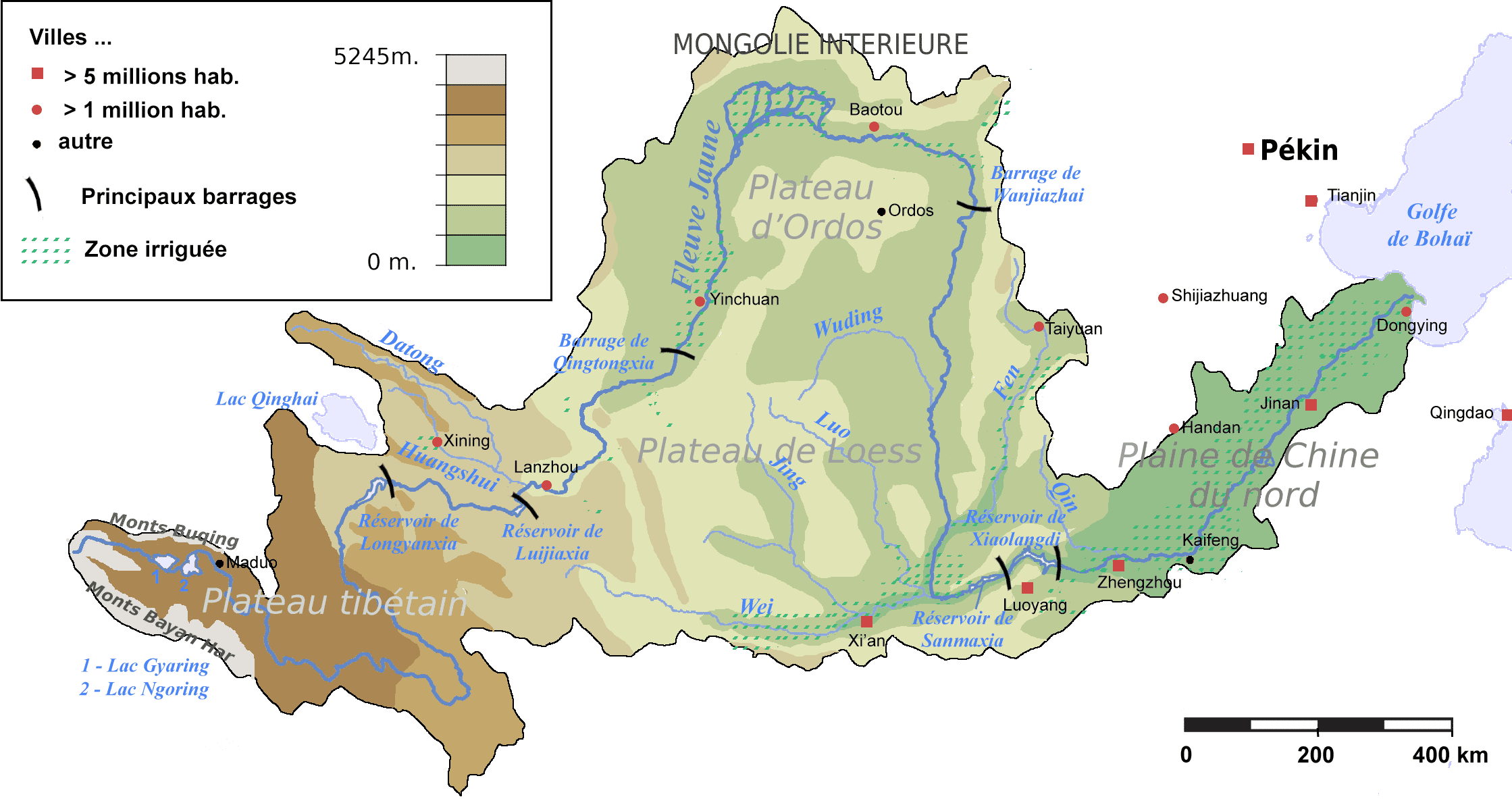 Bassin du fleuve jaune (Chine)